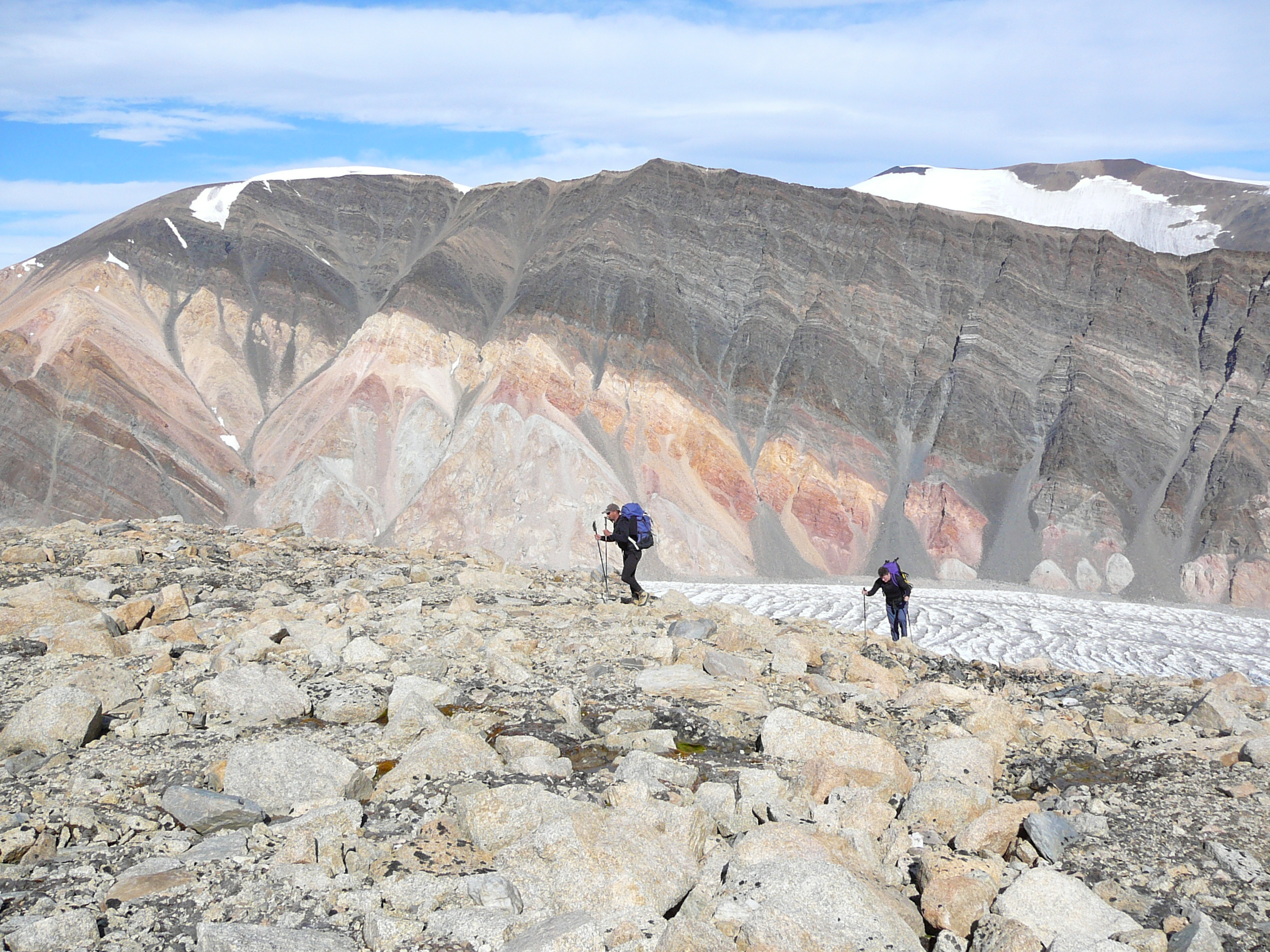 Greenland